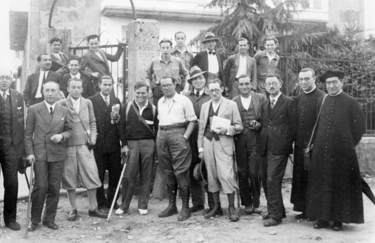 Campaña do Seminario de Estudos Galegos para o estudo das Terras de Deza. Foto tomada diante da casa de Ramón María Aller, Lalín, xuño de 1934. Aparecen, diante: Otero Pedrayo, Iglesias Vilarelle, Parga Pondal, Ferreiro Panadeiro, Pedro Brañas Cancelo, Fernández Osorio, Fernández Cochón, Vicente Risco, González García-Paz, Antón Taboada Roca, Paulino Pedret, Xesús Carro. Detrás: Antón Fraguas, Jaime Vidal, Enrique Longa Vázquez, Xohán Ledo, Isla Couto, Ferreirós Espinosa, López Cuevillas, Vicente Hermida e Ramos Colemán